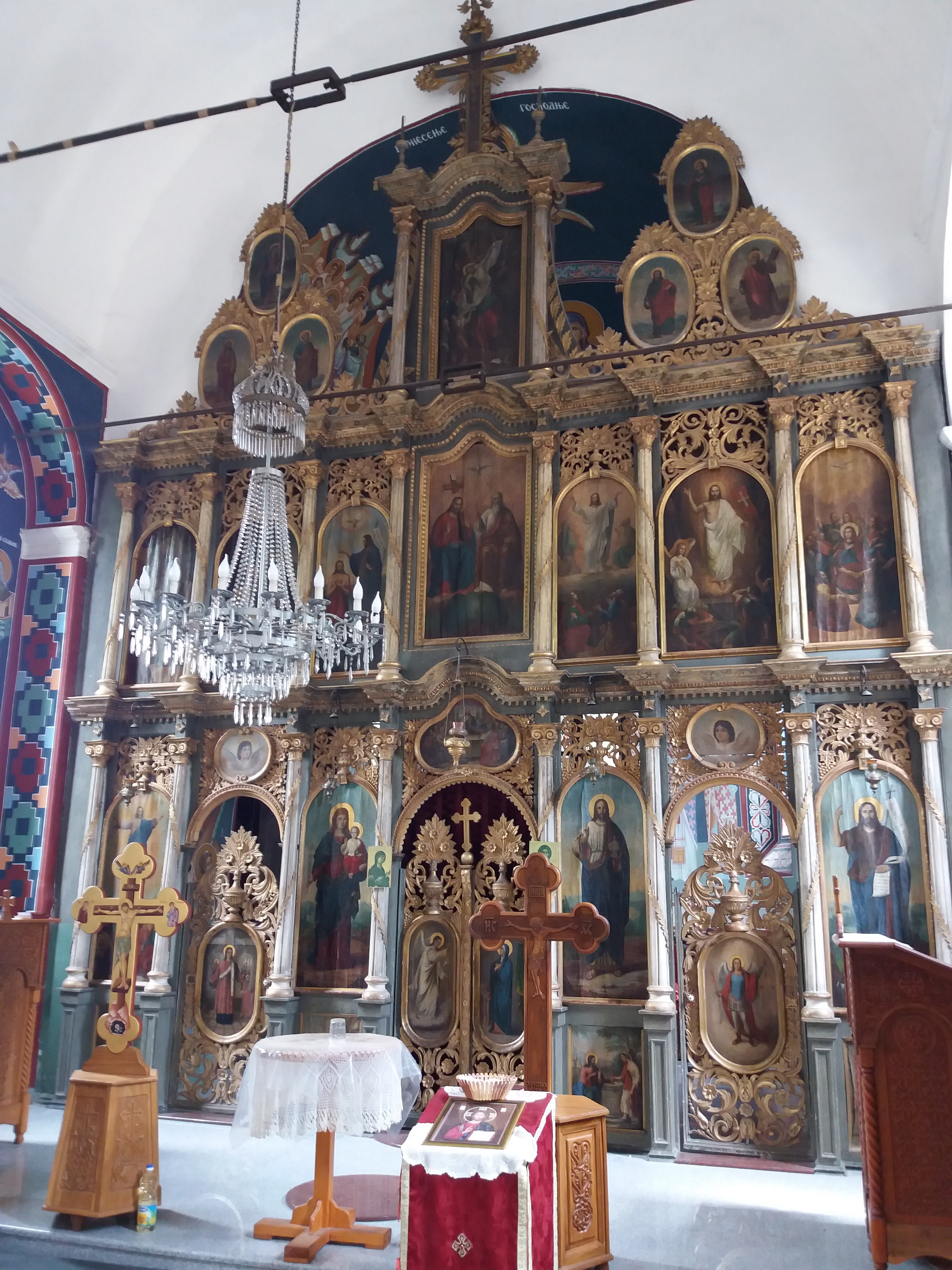 Srpski (latinica): Crkva Svetog Vaznesenja, Golobok